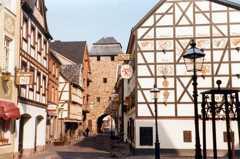 Ahrweiler, Bad Neuenahr-Ahrweiler